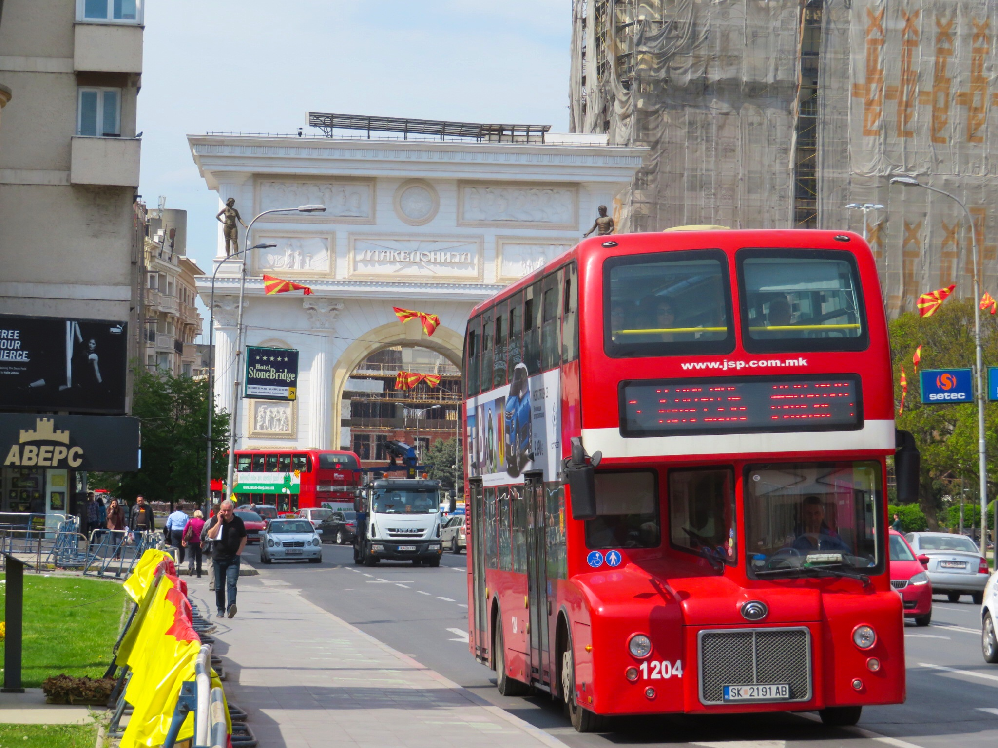 Skopje, Macedonia